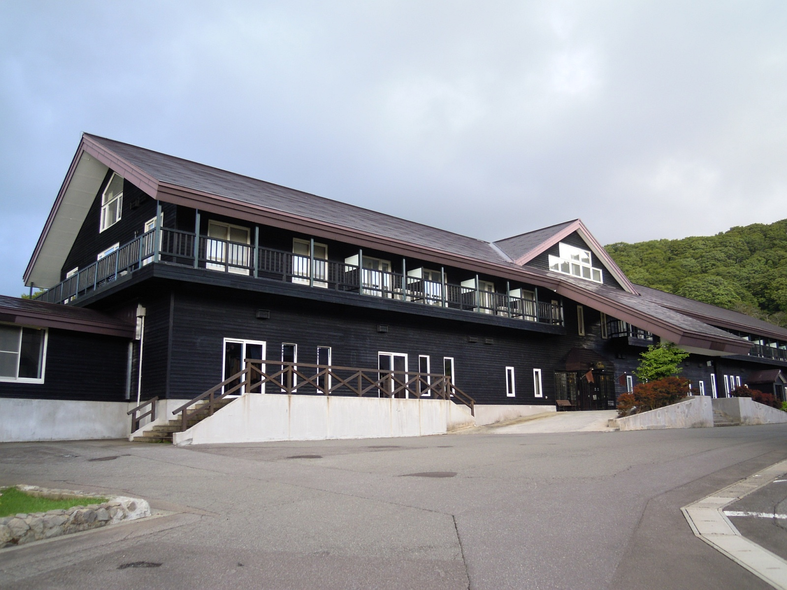 青森県青森市にある城ヶ倉温泉の「ホテル城ヶ倉」